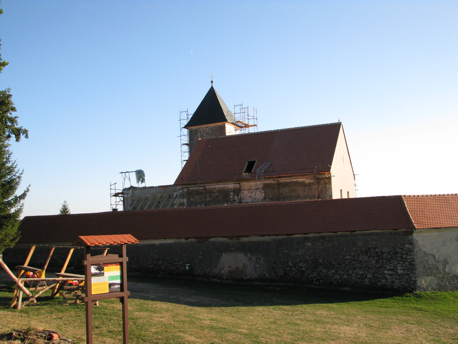 Svetište iznad Lobora